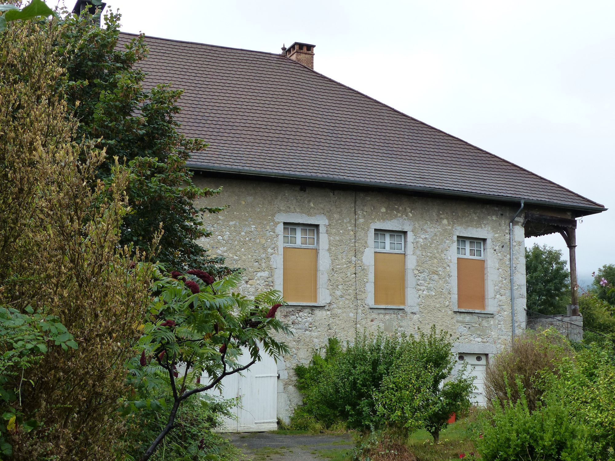 Vue d'une aile du bâtiment du logis abbatial, ancienne abbaye de Ayes à Crolles (38)